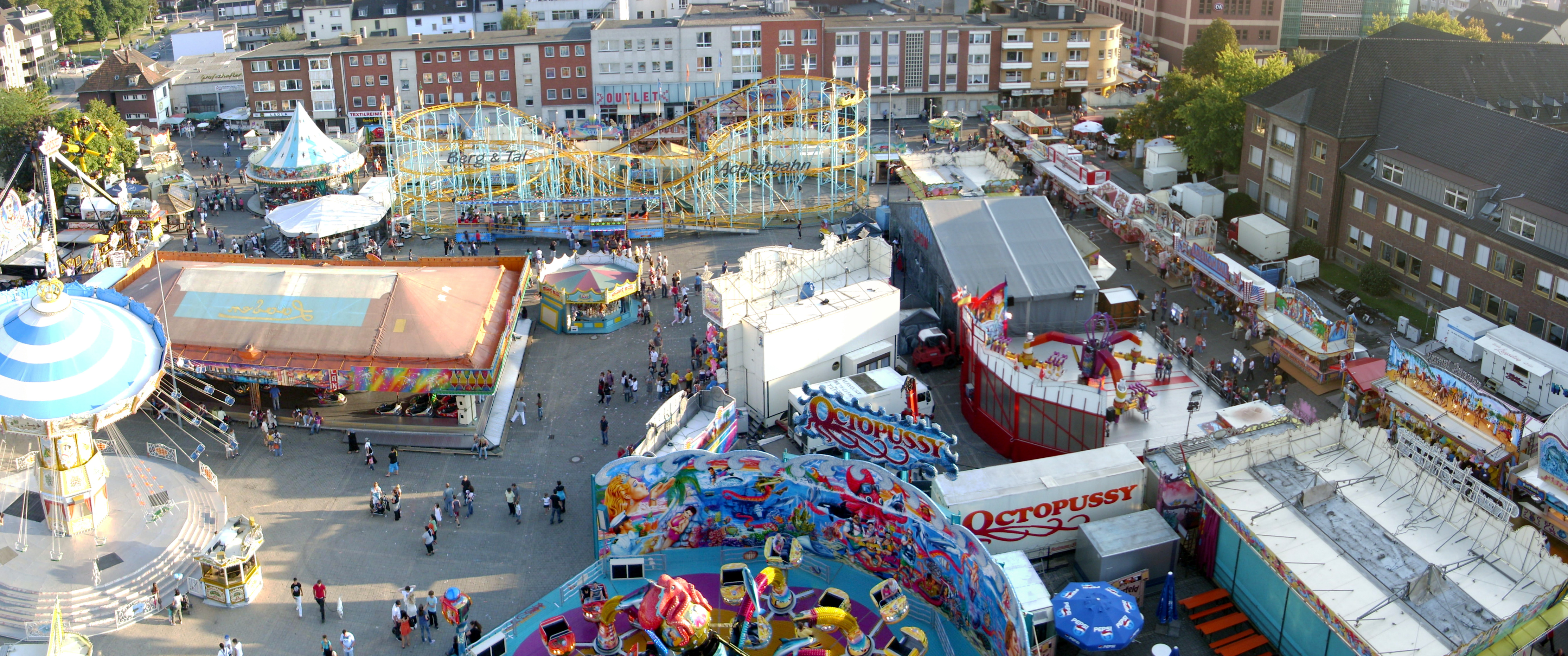 Panorama der Moerser Kirmes auf dem Friedrich-Ebert-Platz